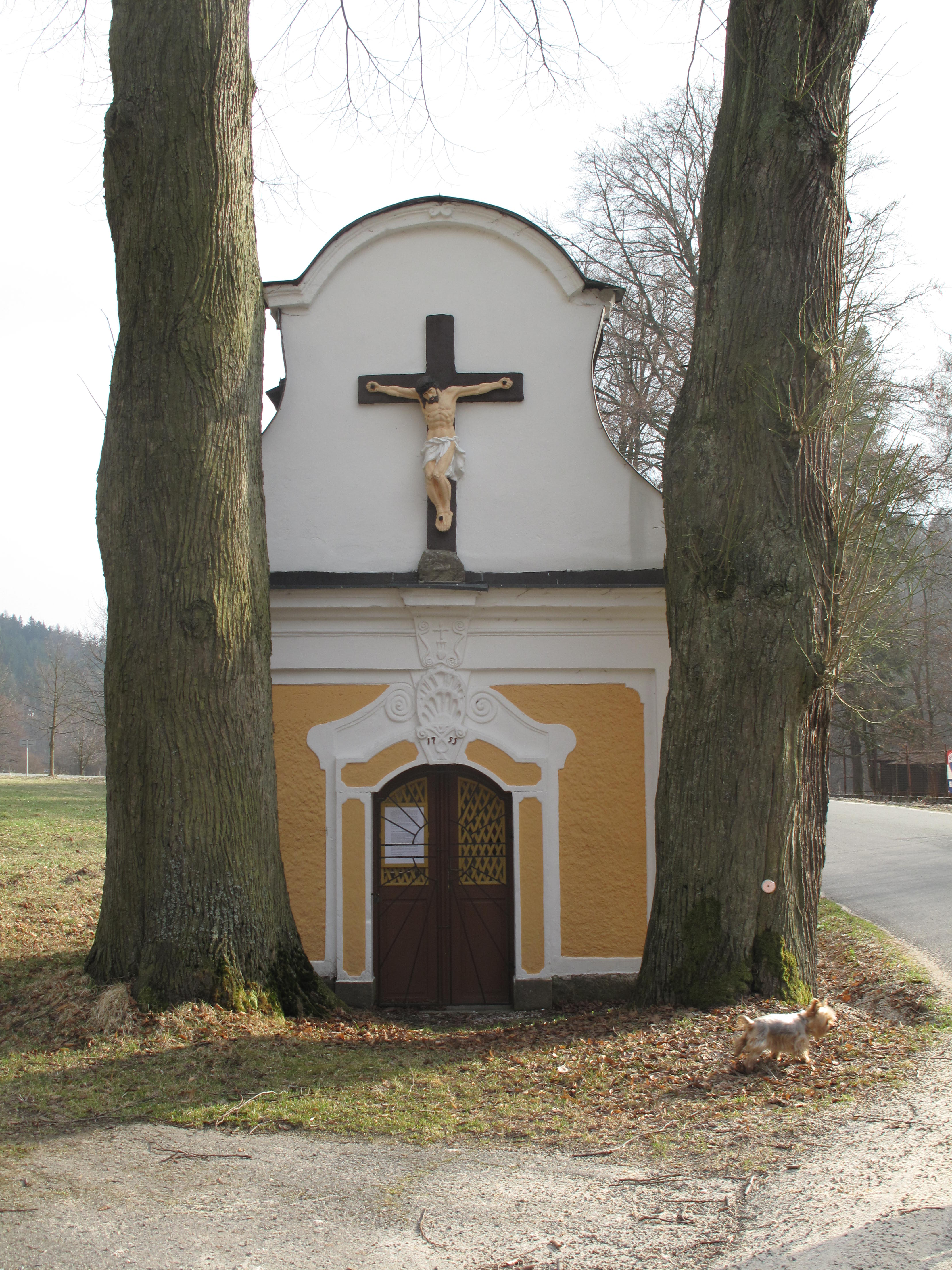 Česky: Kaple svaté Anny v Dědově